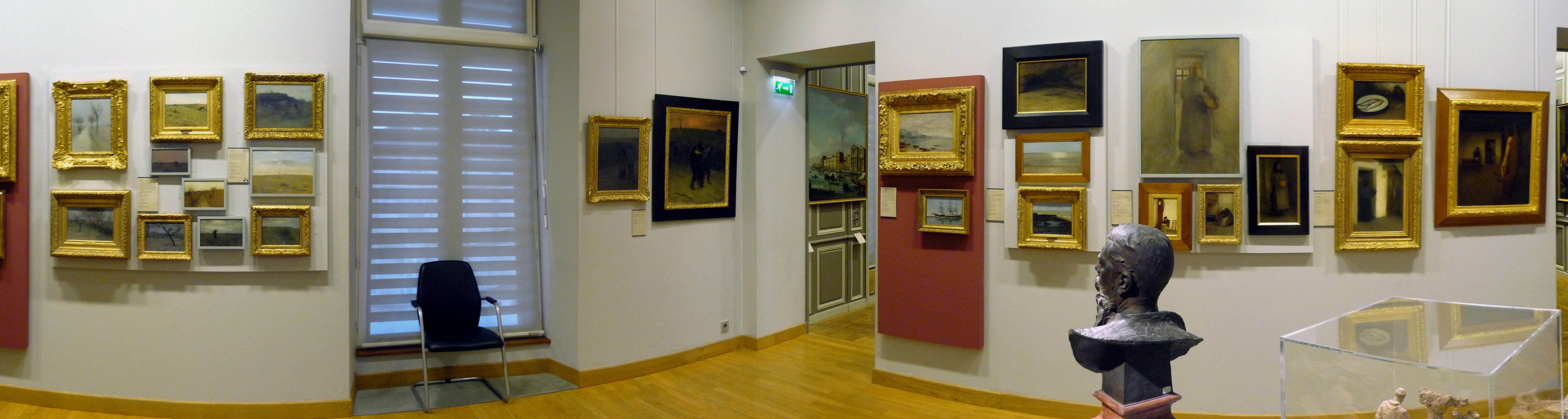 "L'atelier des artistes charentais" : vue partielle des tableaux de Léonard Jarraud devant son buste, Musée d'Angoulême, Charente, (France).